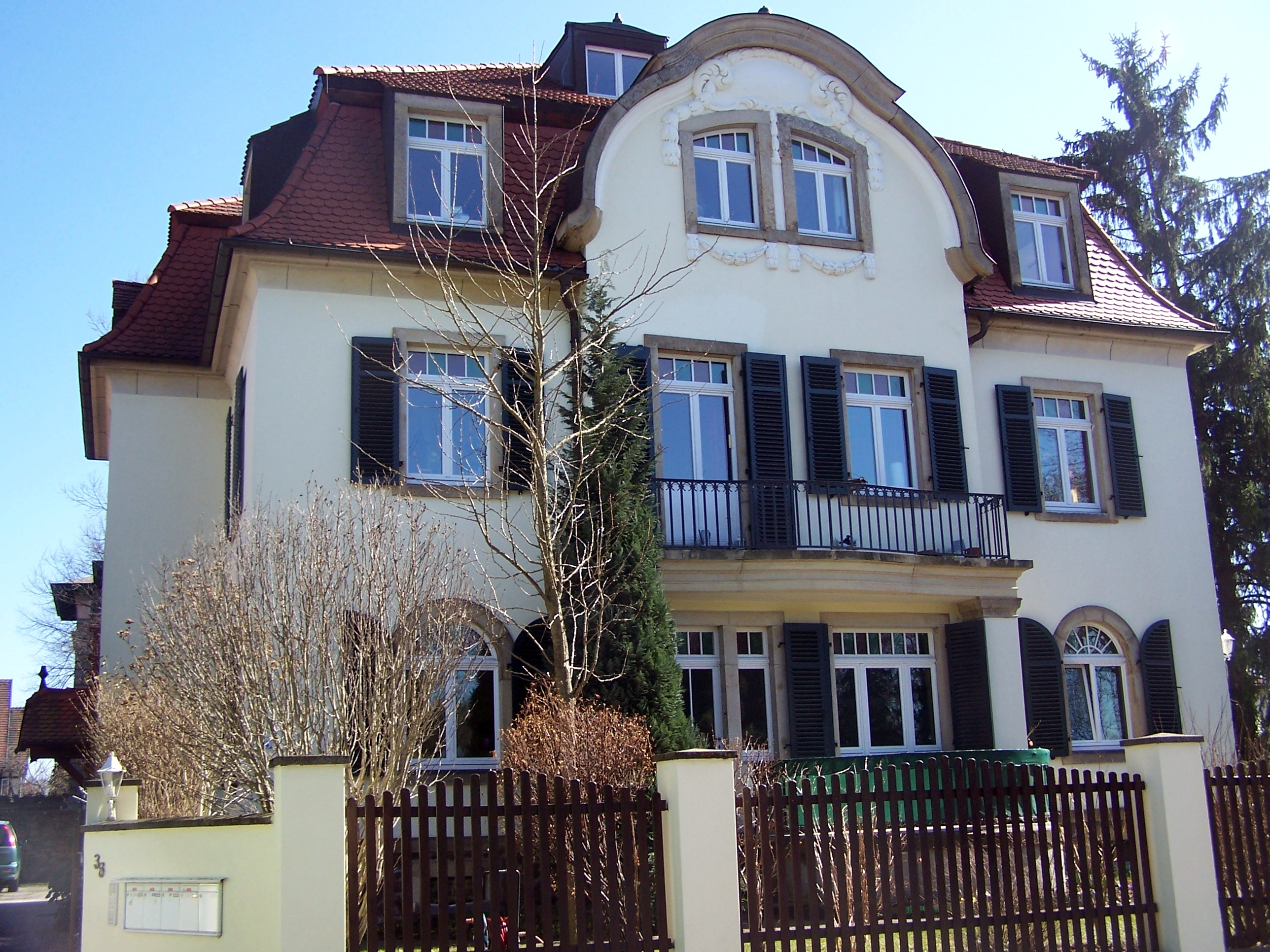 Wasastr. 38 in Radebeul